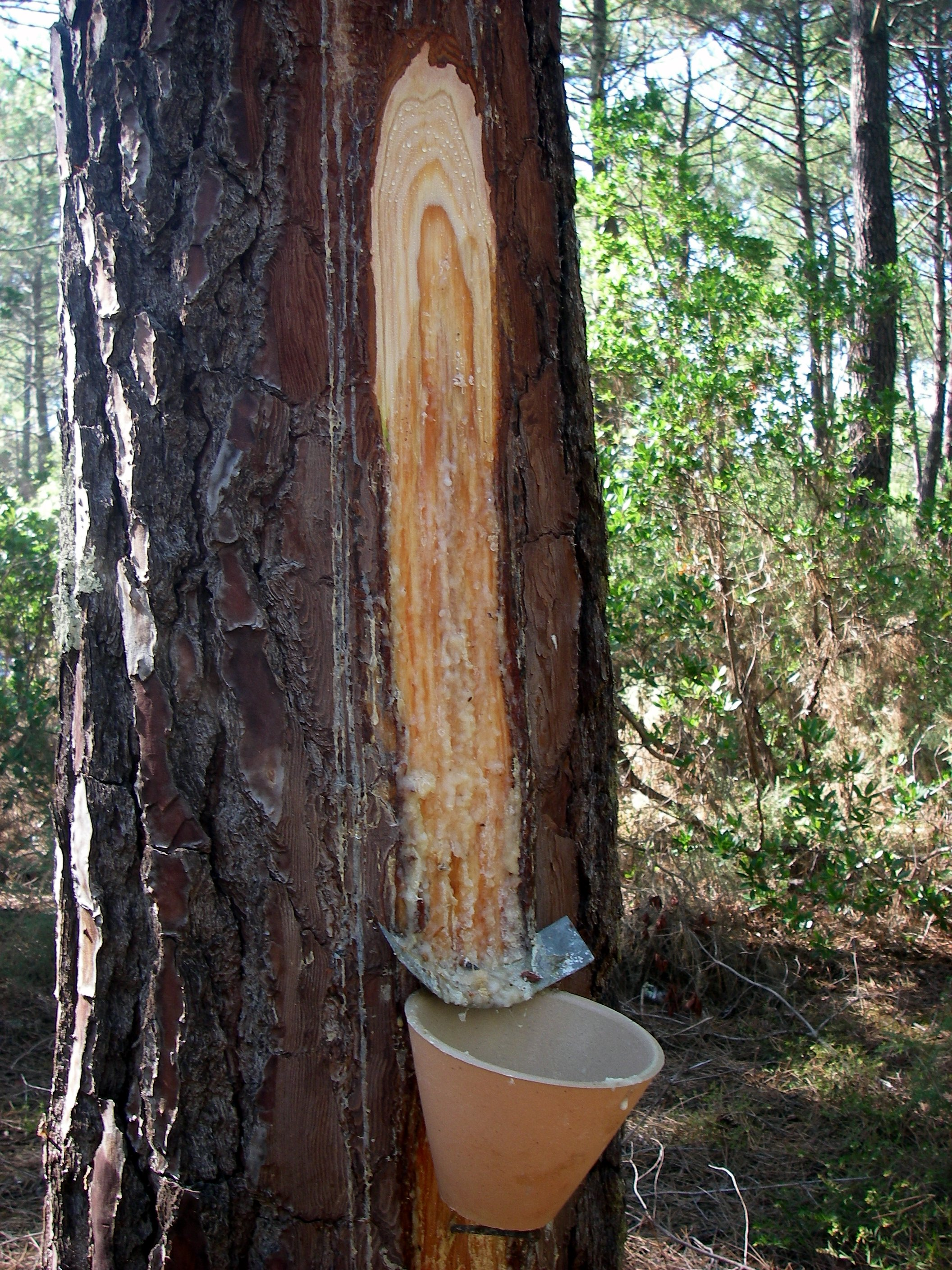 Photo personnelle, Aout 2006. Pin gemmé à La Teste de Buch